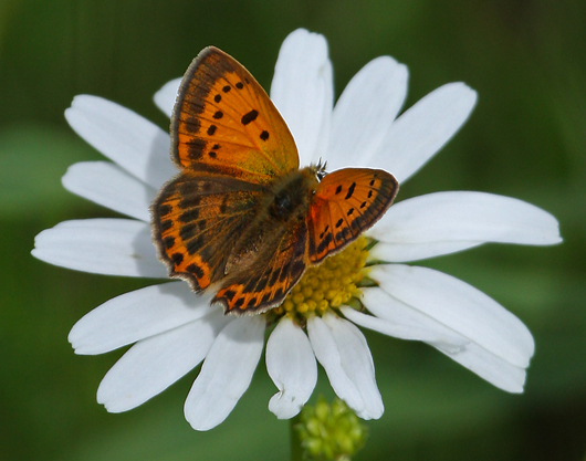 Loistokultasiipinaaras